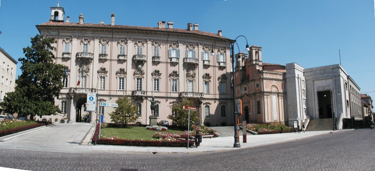 Pavia (Foto di Luigino C.)